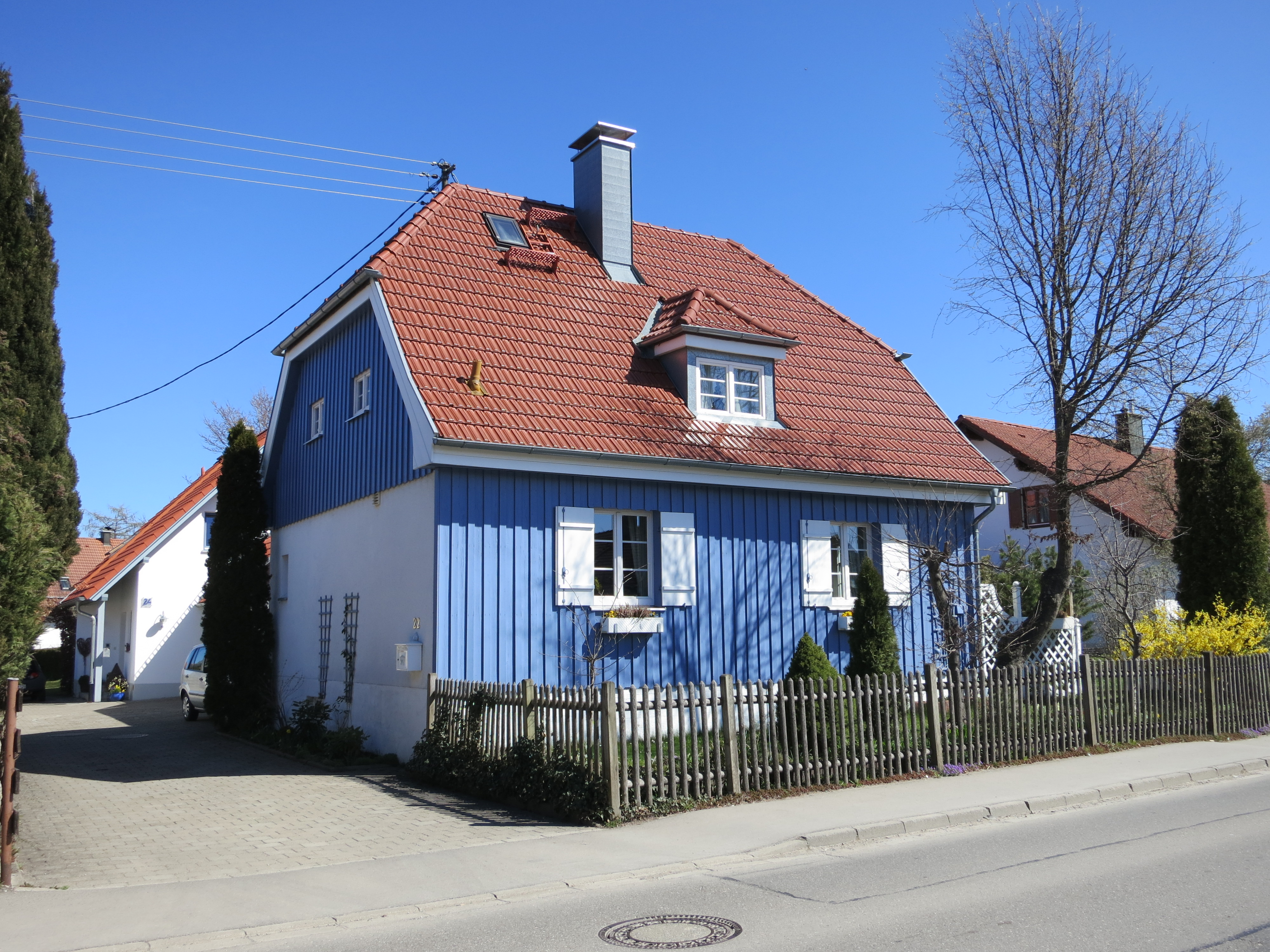 Ehemaliges Bahnwärterhaus am Bahnhof Mauerstetten an der stillgelegten Bahnstrecke Kaufbeuren–Schongau